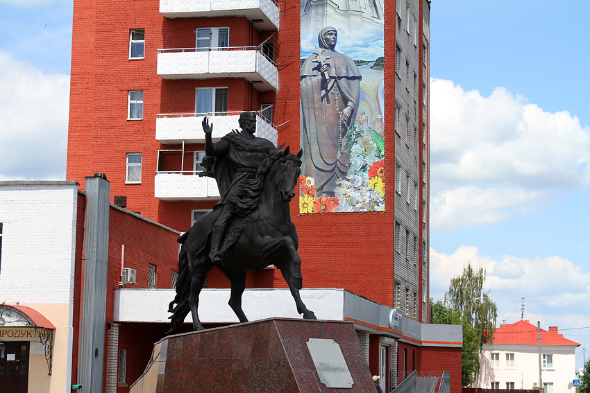 Полацк. Помнік Усяславу Брачыслававічу